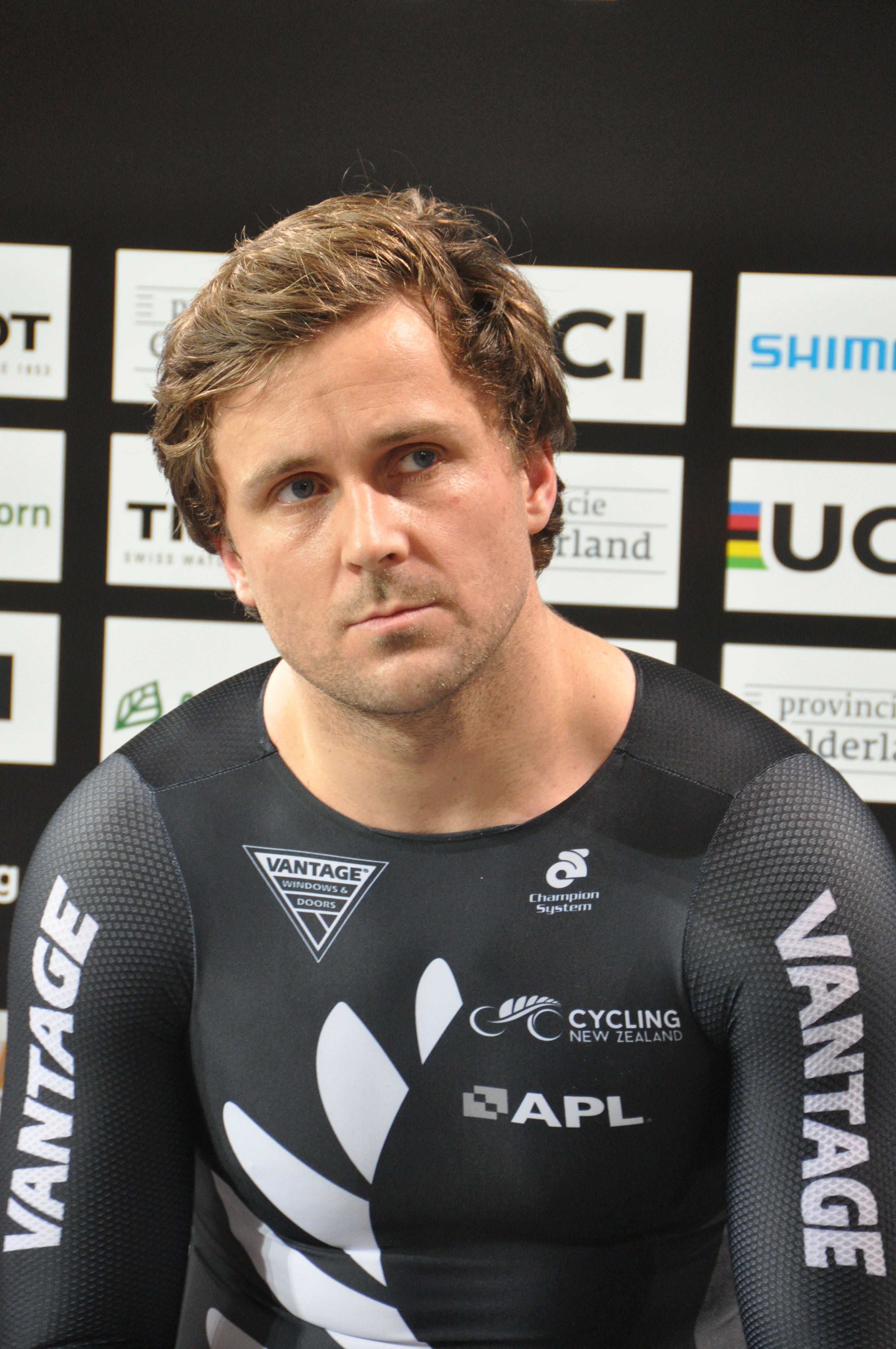 Simon van Velthooven, neuseeländischer Radsportler